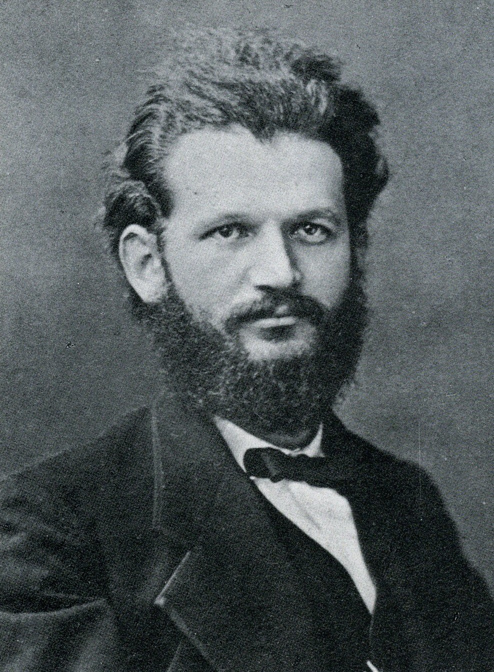 Heinrich Heydemann. Foto aus dem Henzen-Album, Nr. LXII